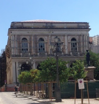 Facciata della Biblioteca Tommasi de L'Aquila